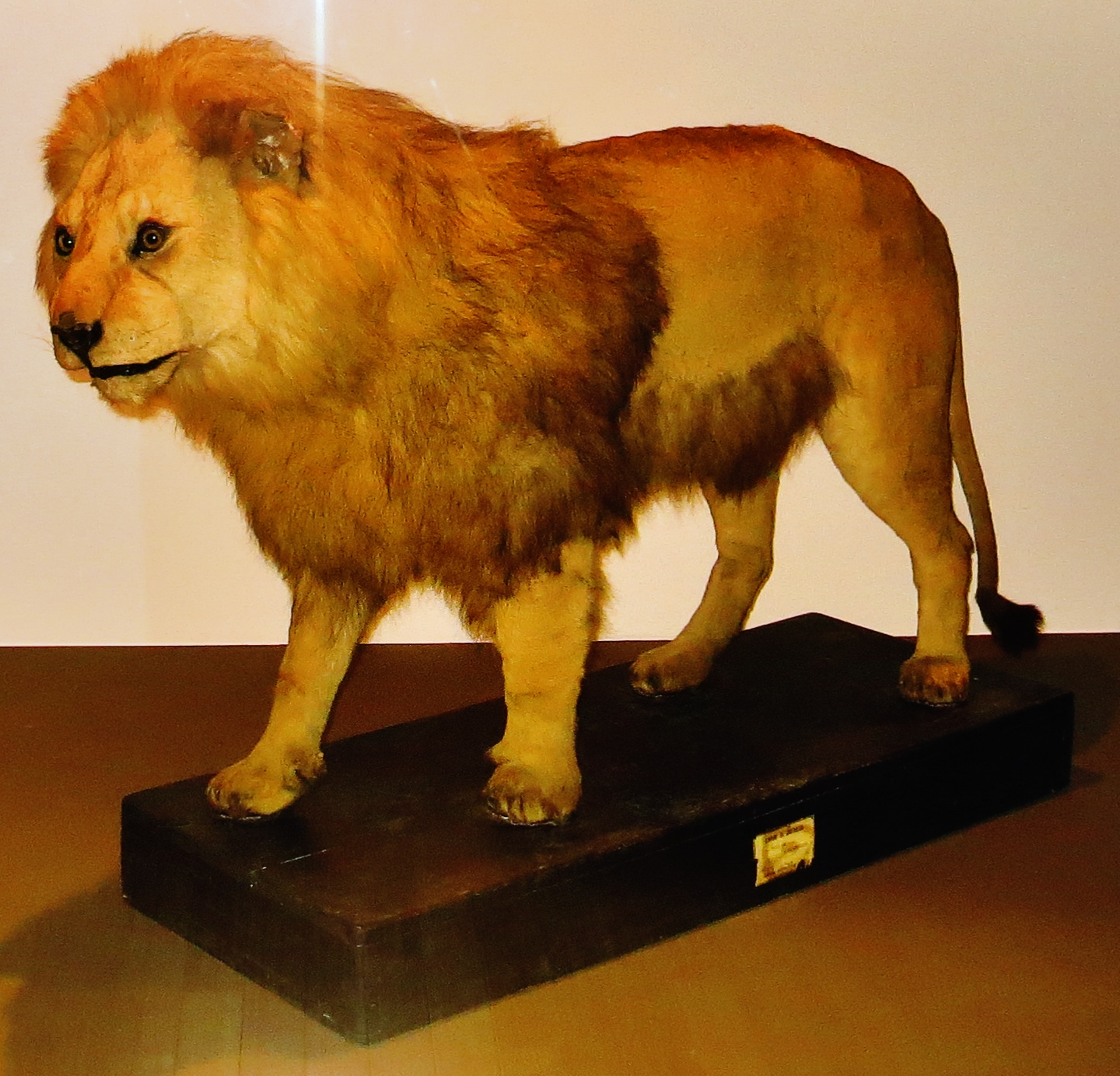 Barbary lion - Took the picture at MUSE, Trento